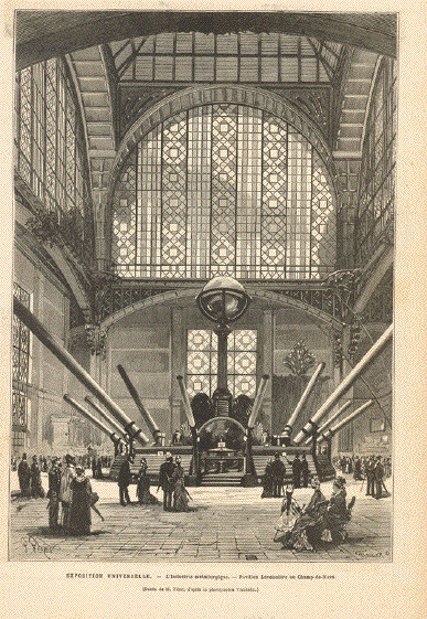 Exposition Universelle. - L'Industrie metallurgique. - Pavillon Laveissiere au Champ-de-Mars